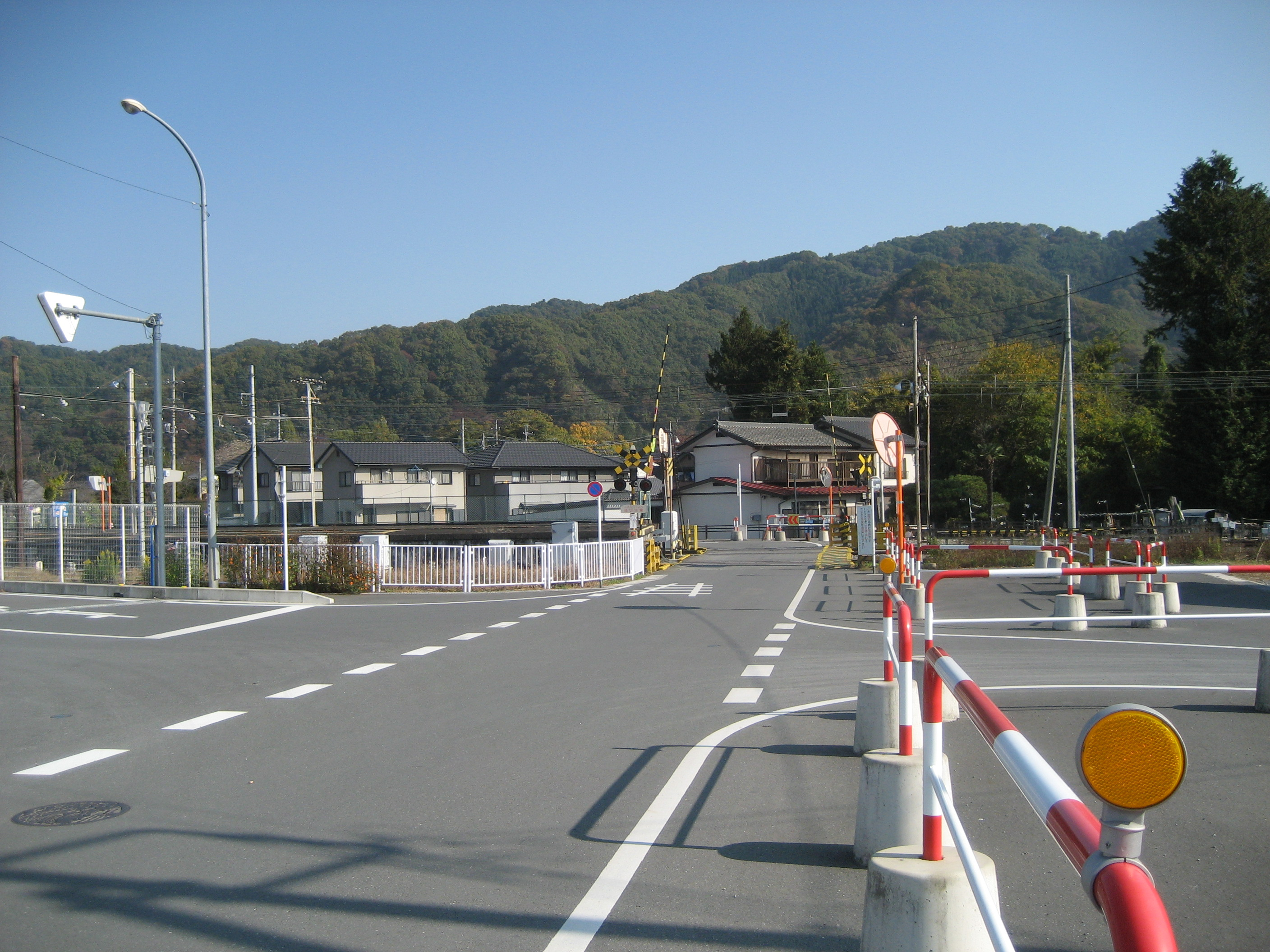 埼玉県道204号線長瀞町上長瀞駅付近